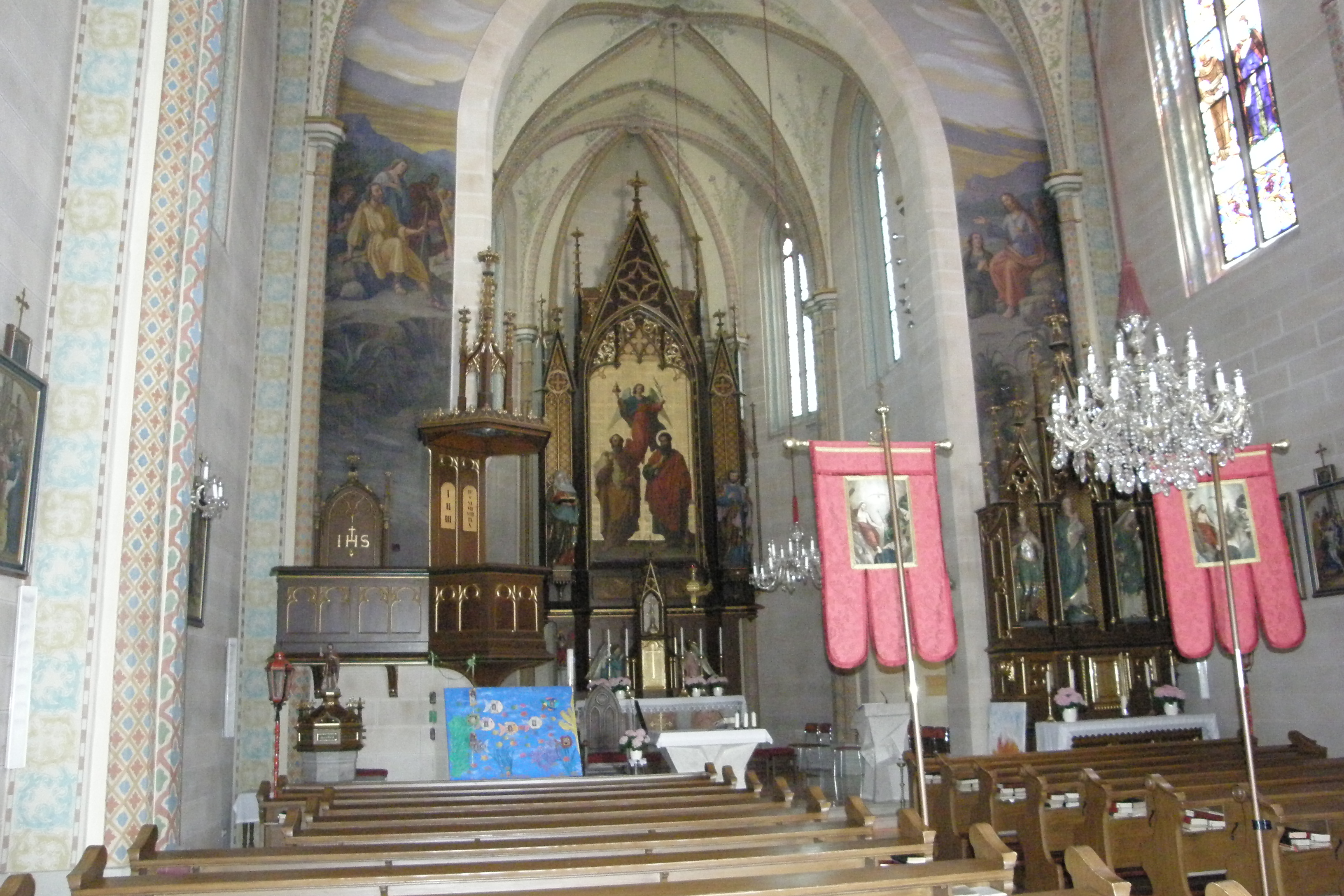 Kath. Pfarrkirche hll. Petrus und Paulus